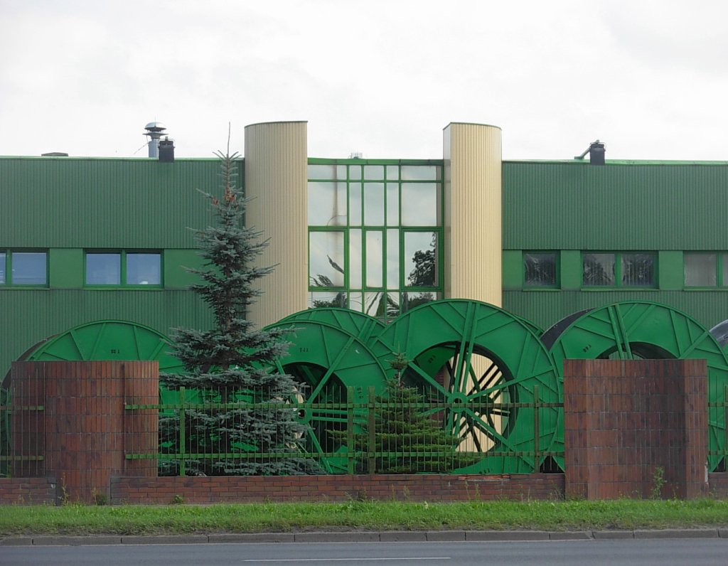 Telefonika Kable Bydgoszcz